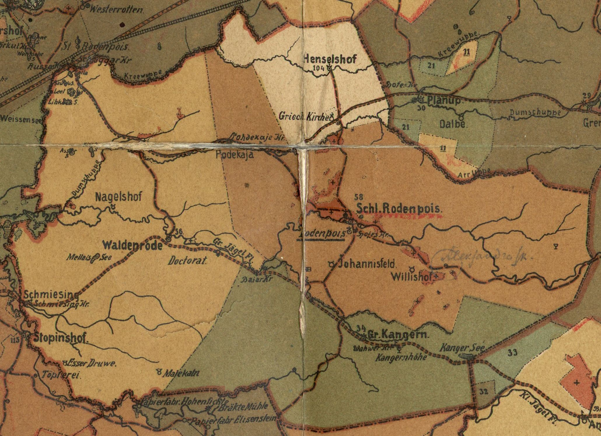 Ropaži kihelkonna mõisad 1905. aasta kaardil